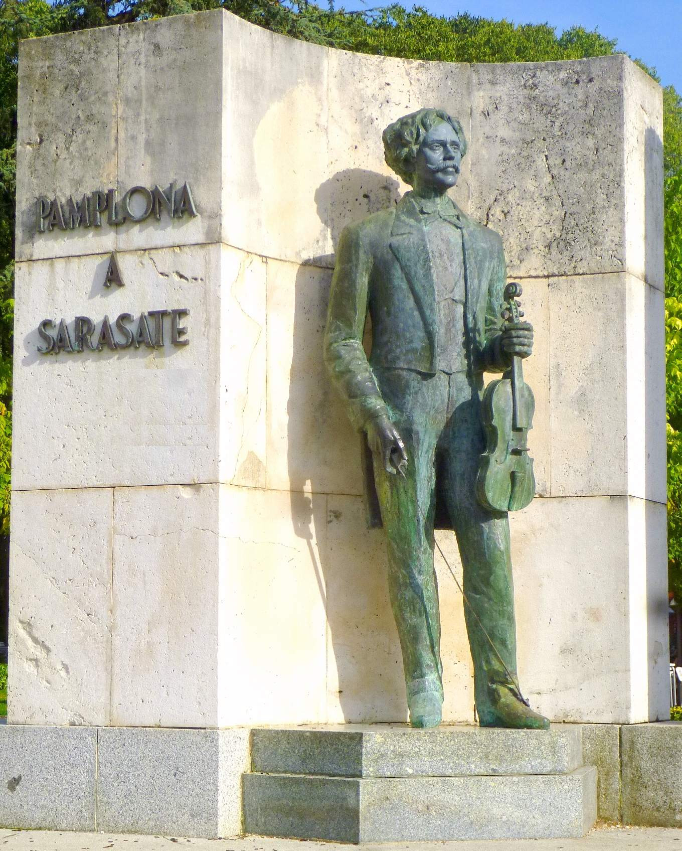 Monumento a Pablo Sarasate (Parque de la Media Luna, Pamplona)